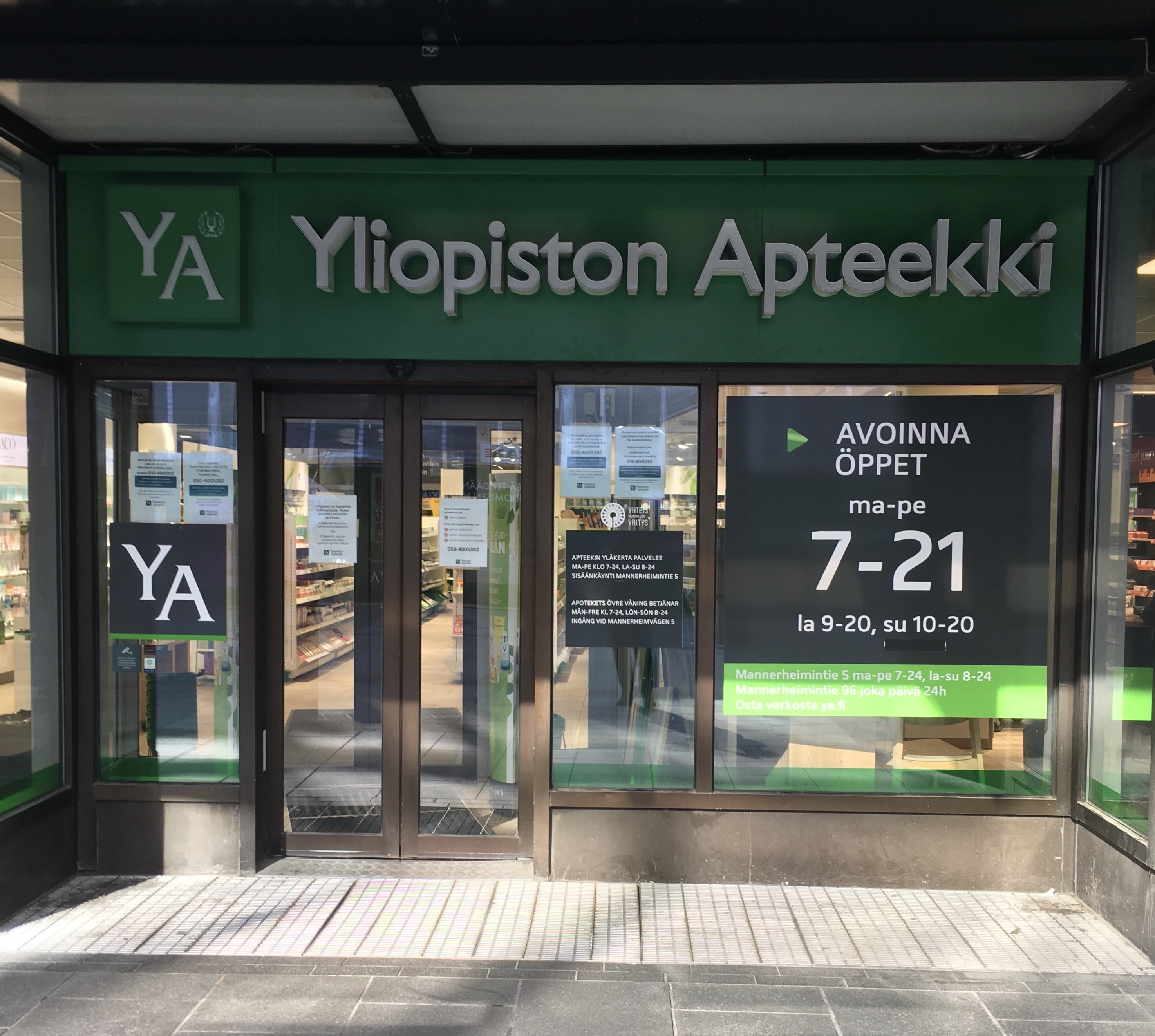 sisäänkäynti Yliopiston apteekkiin Kaivopihan puolelta, Helsinki